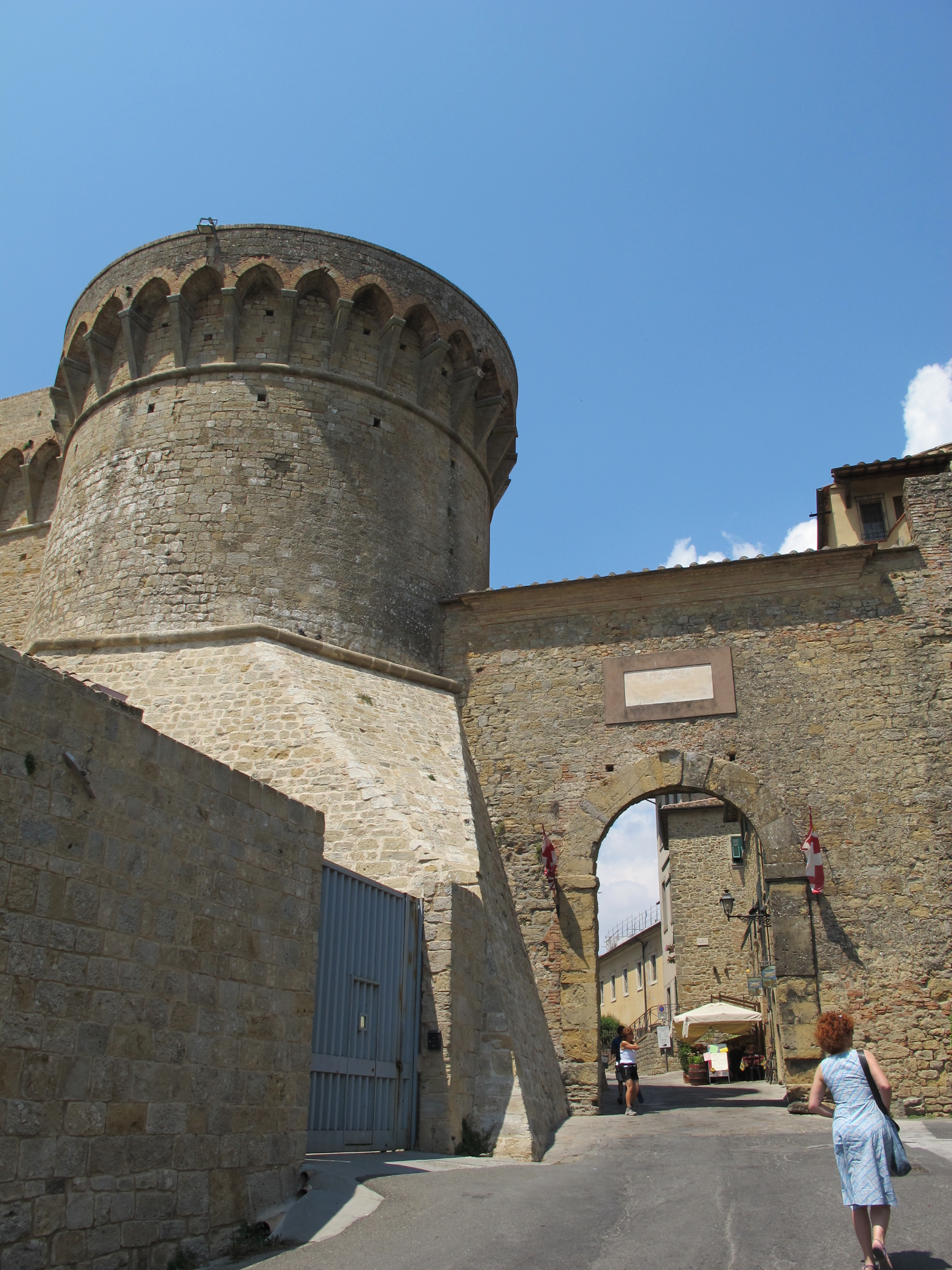 Fortezza di volterra 04 porta